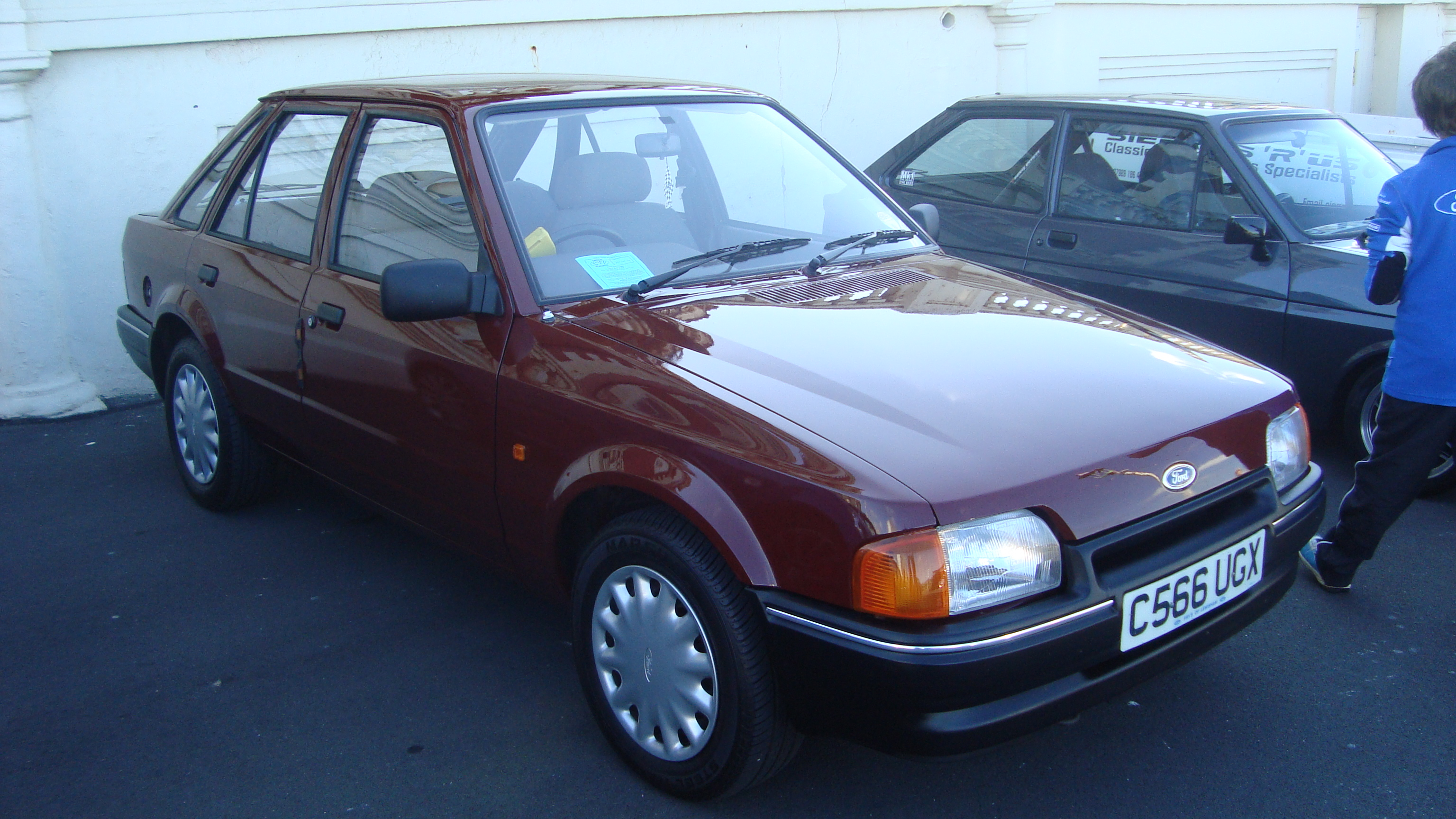 1986 Ford Escort 1.4 L 5SPD